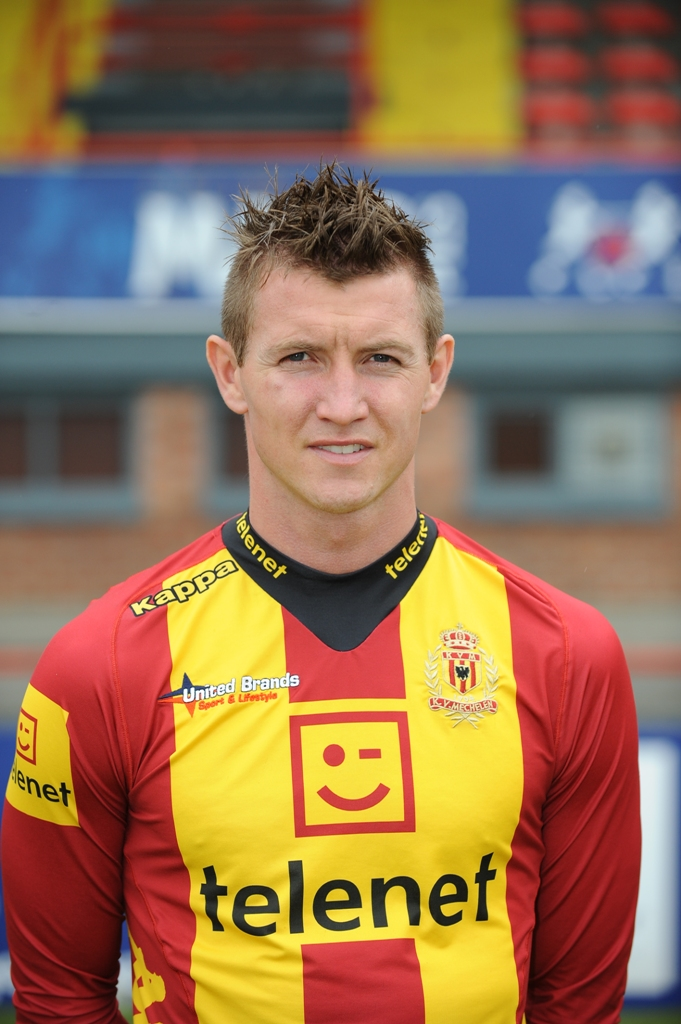 Deens voetballer bij KV Mechelen